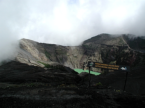 Fotografía del Volcán Irazú